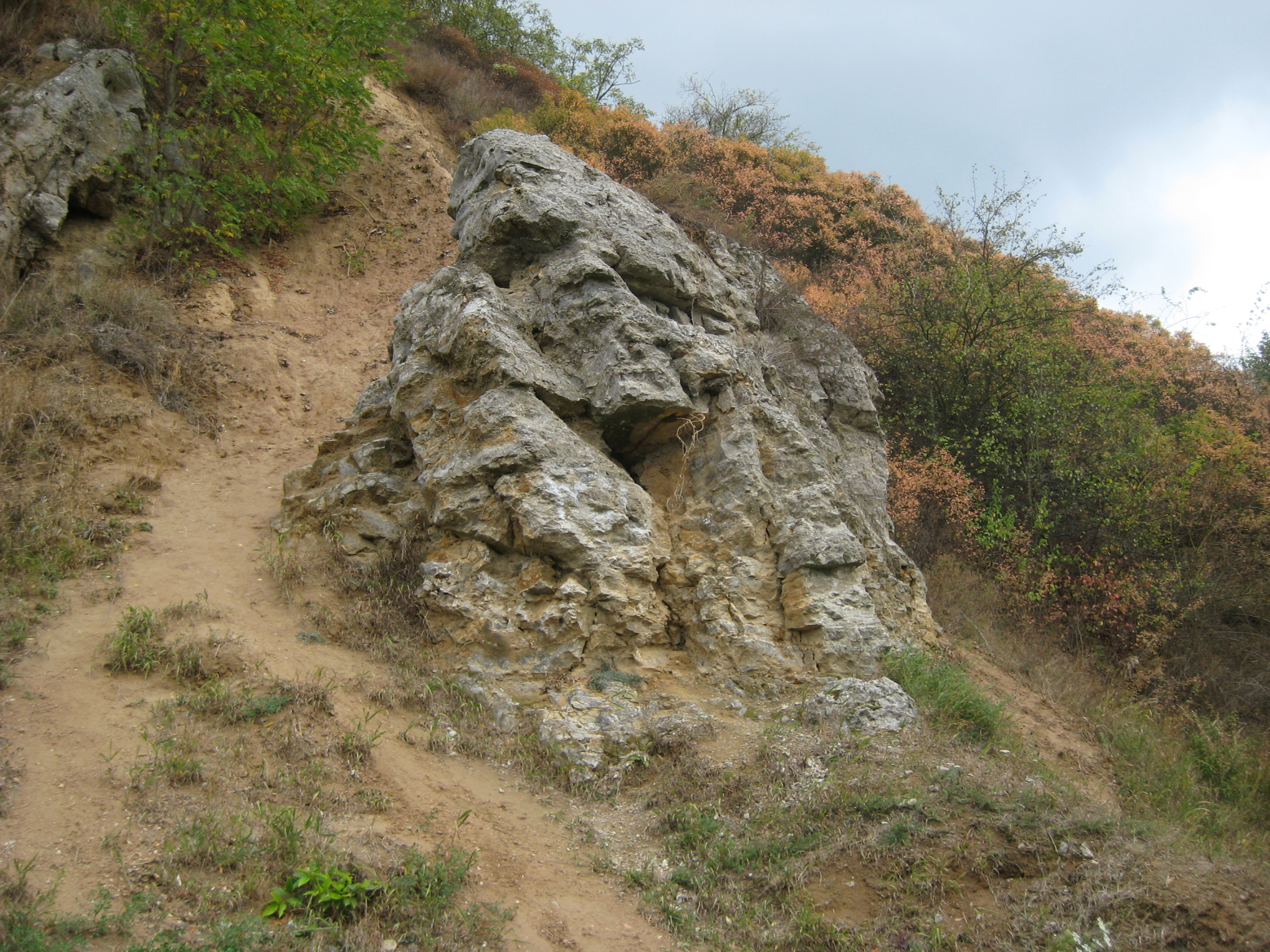 Kalkgestein? (laut Infotafel der Station 1 des Boden-Geo-Pfads: Gipsfelsen) an den ehemaligen Gipsbrüchen in Sperenberg; Naturschutzgebiet „Sperenberger Gipsbrüche“.